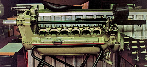 Einbaulage 20-mm-Kanone im HS12-Ydrs-Motor. Die Zylinder wurden zur besseren Ansicht entfernt.